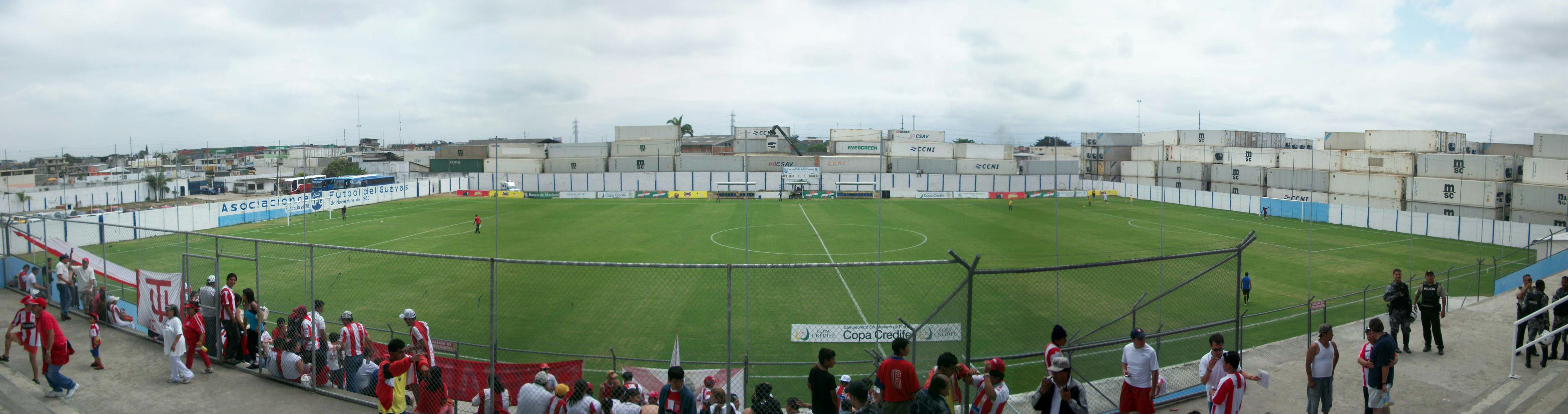 Estadio fertisa